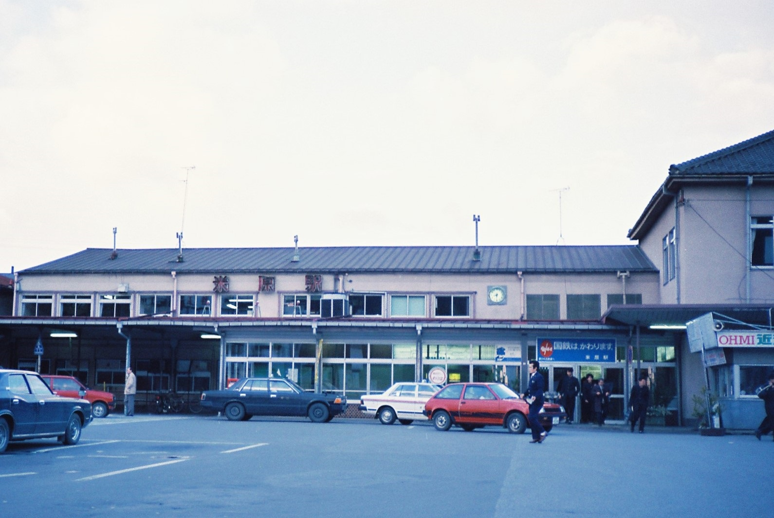 米原駅東口旧駅舎（1987年1月撮影）